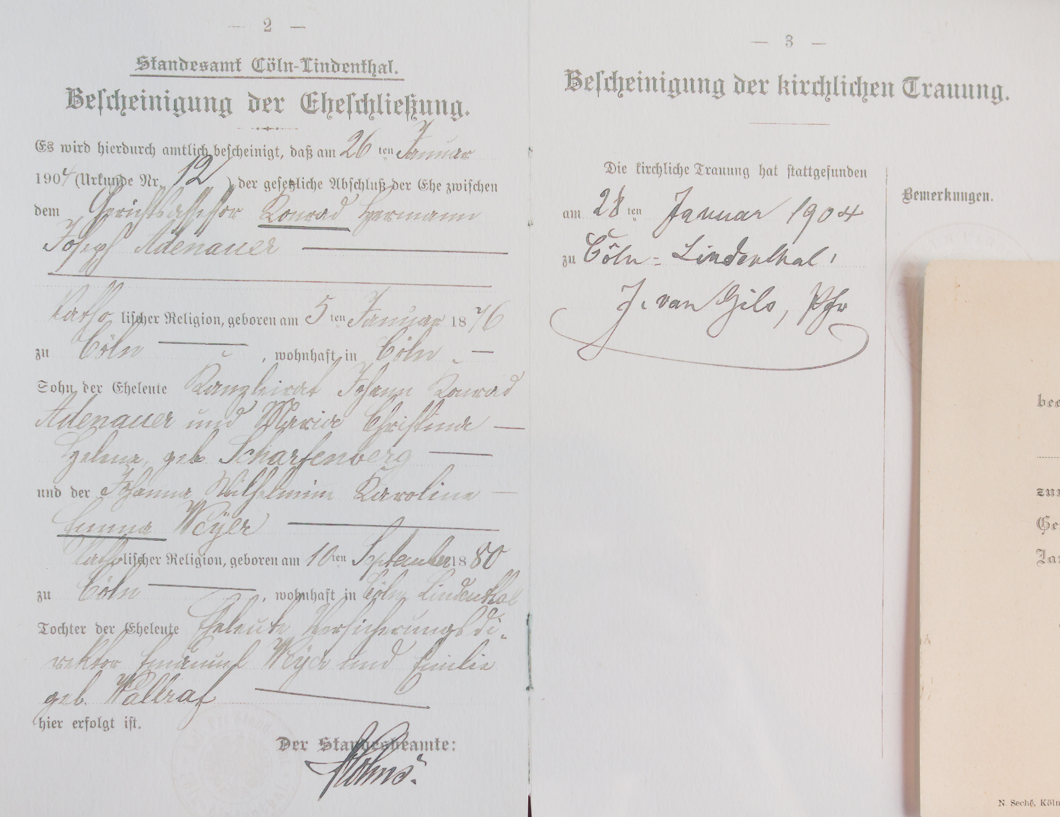 Heiratsurkunde Emma Adenauer und Konrad Adenauer